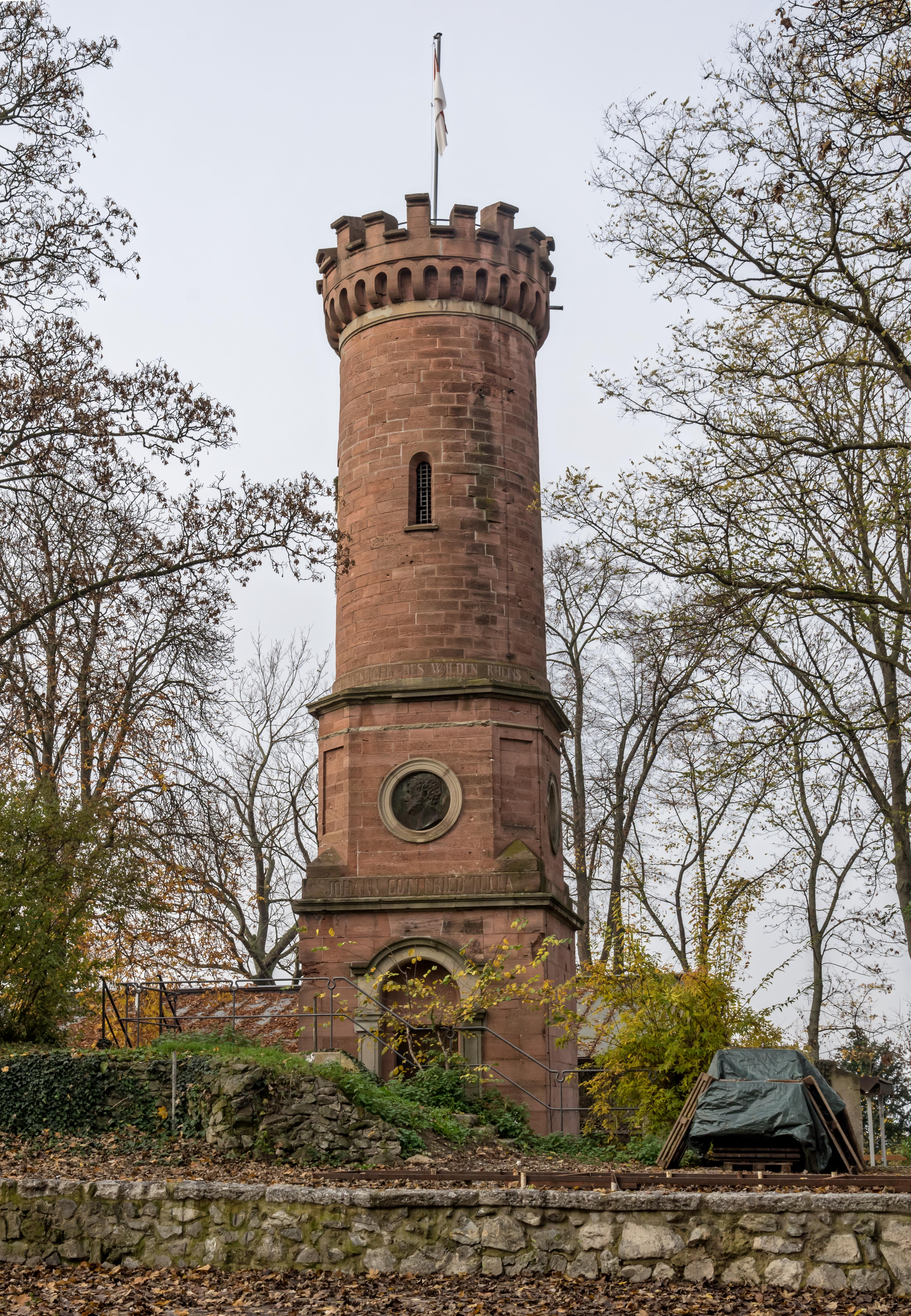 Bilder aus Breisach am Rhein Der Münsterberg Der Tullaturm auf dem Schloßplatz errichtet zu Ehren von Johann Gottfried Tulla